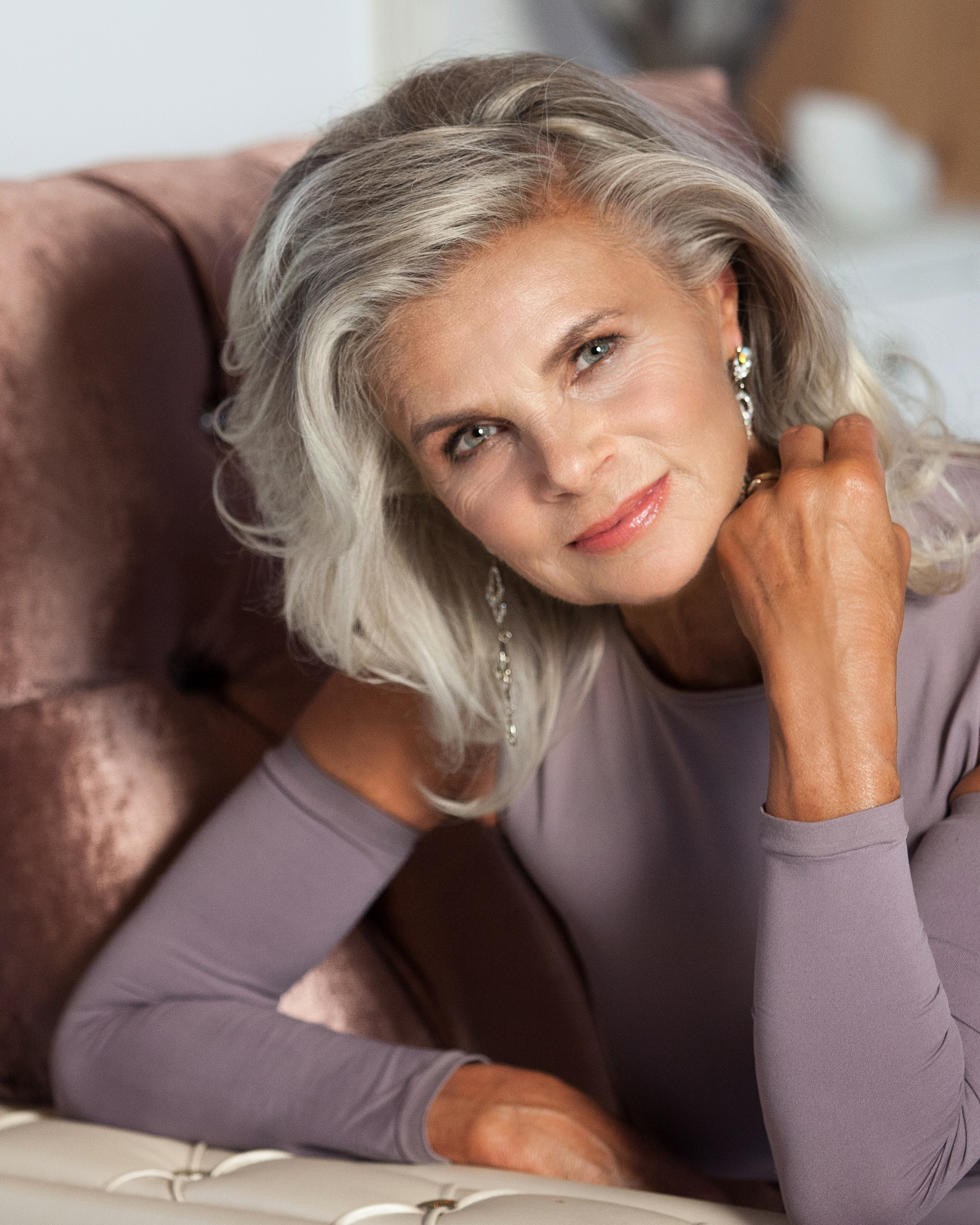 Ein im Spätsommer 2016 entstandenes Modelfoto von Eva Holzapfel